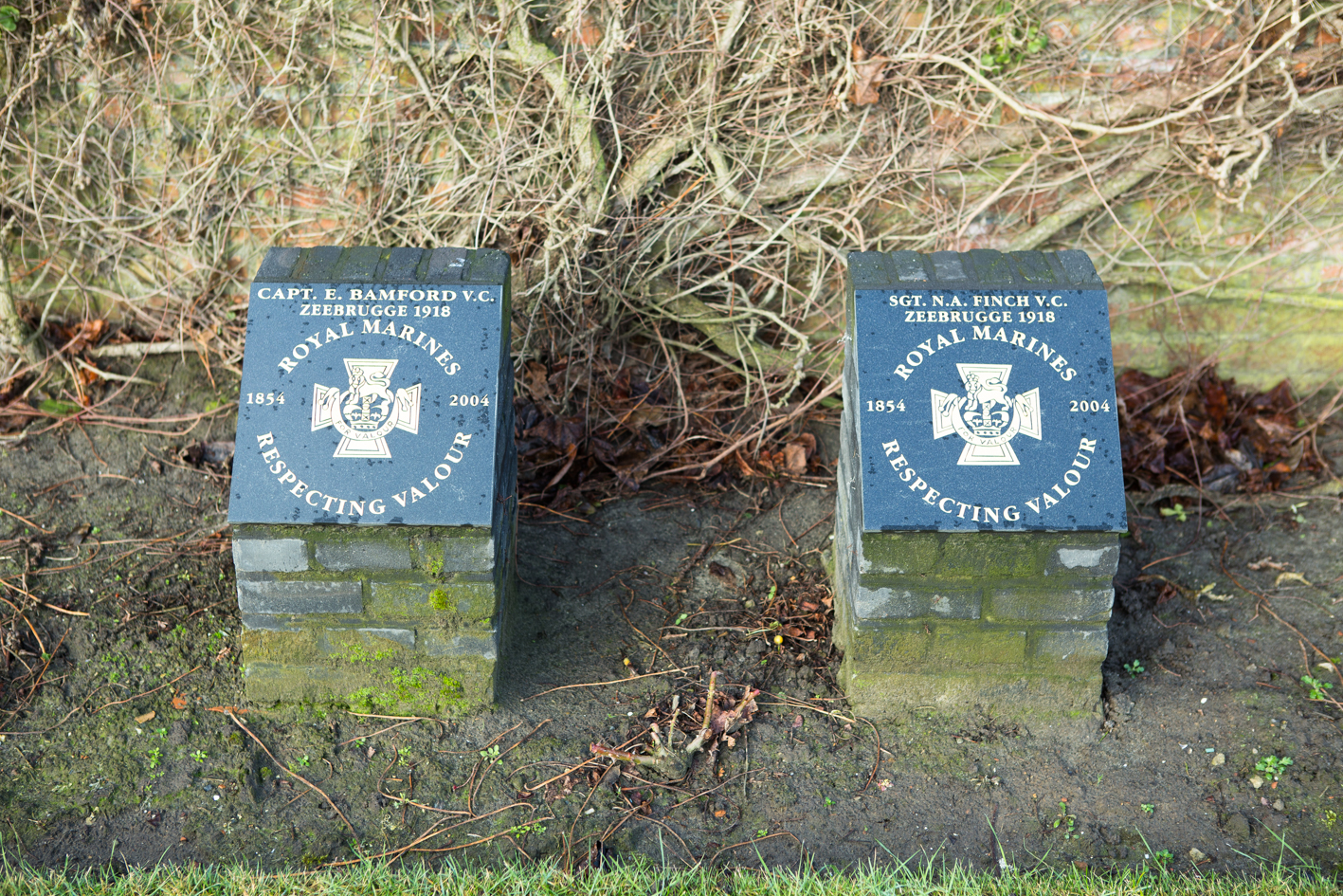 Zeebrugge Churchyard